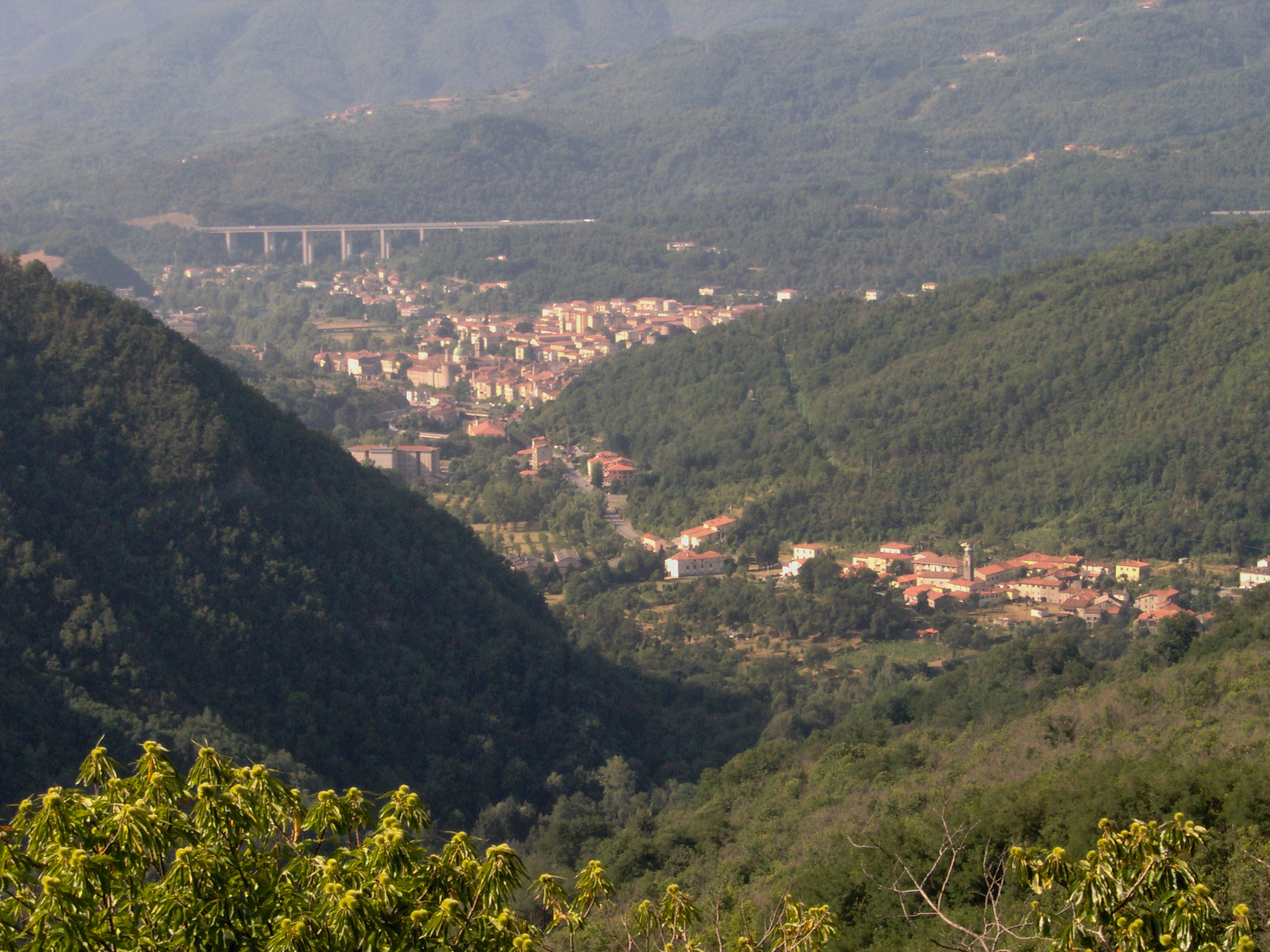 Pontremoli vista dalla SS.62 della Cisa